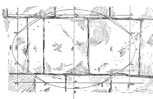 Zeitschrift für ägyptische Sprache und Altertumskunde (Berlin/Leipzig), Journal of the Egyptian Language and Archeology, Vol. 34, 1896, p.75-76